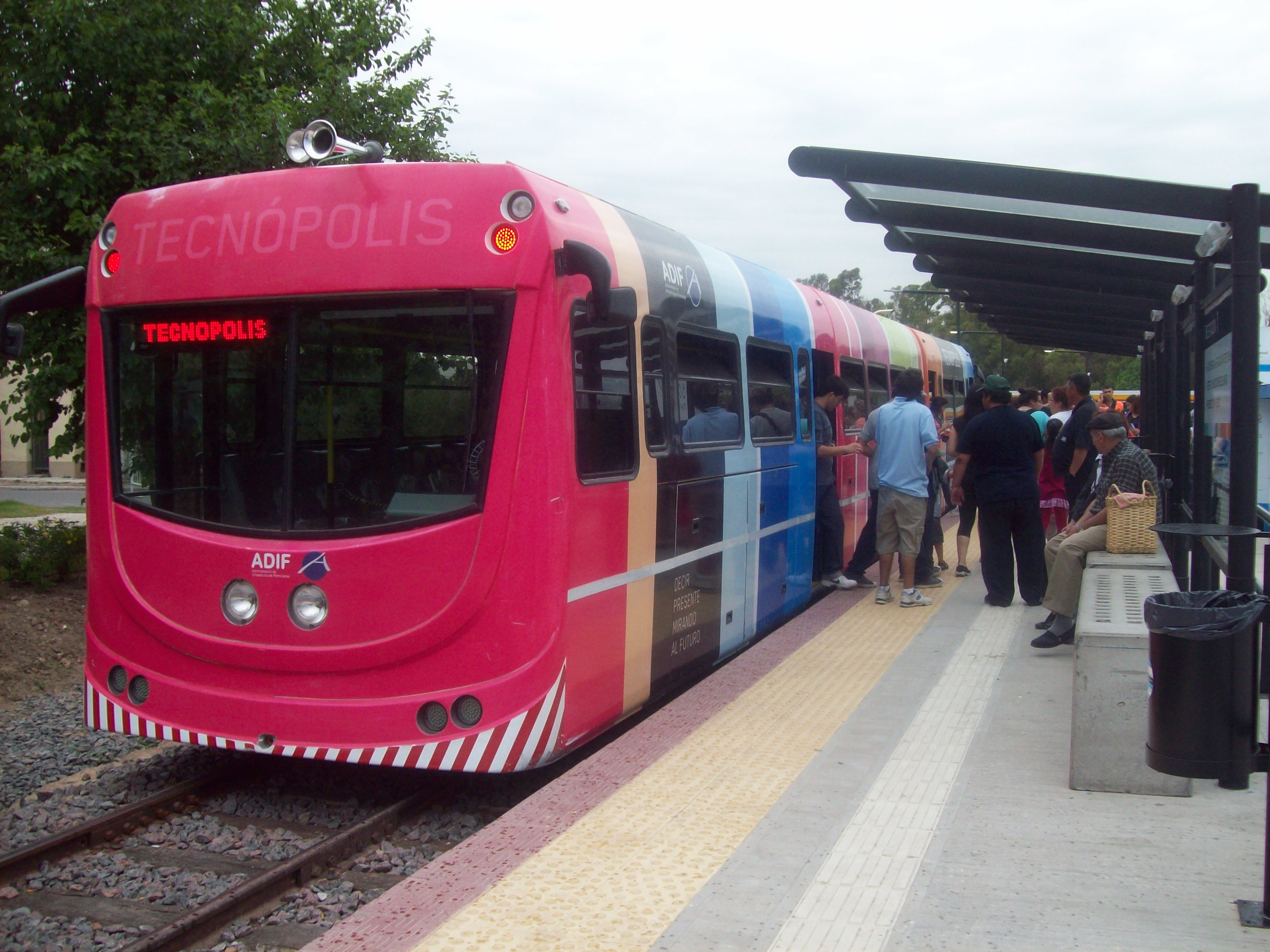 Tren de Tecnópolis.